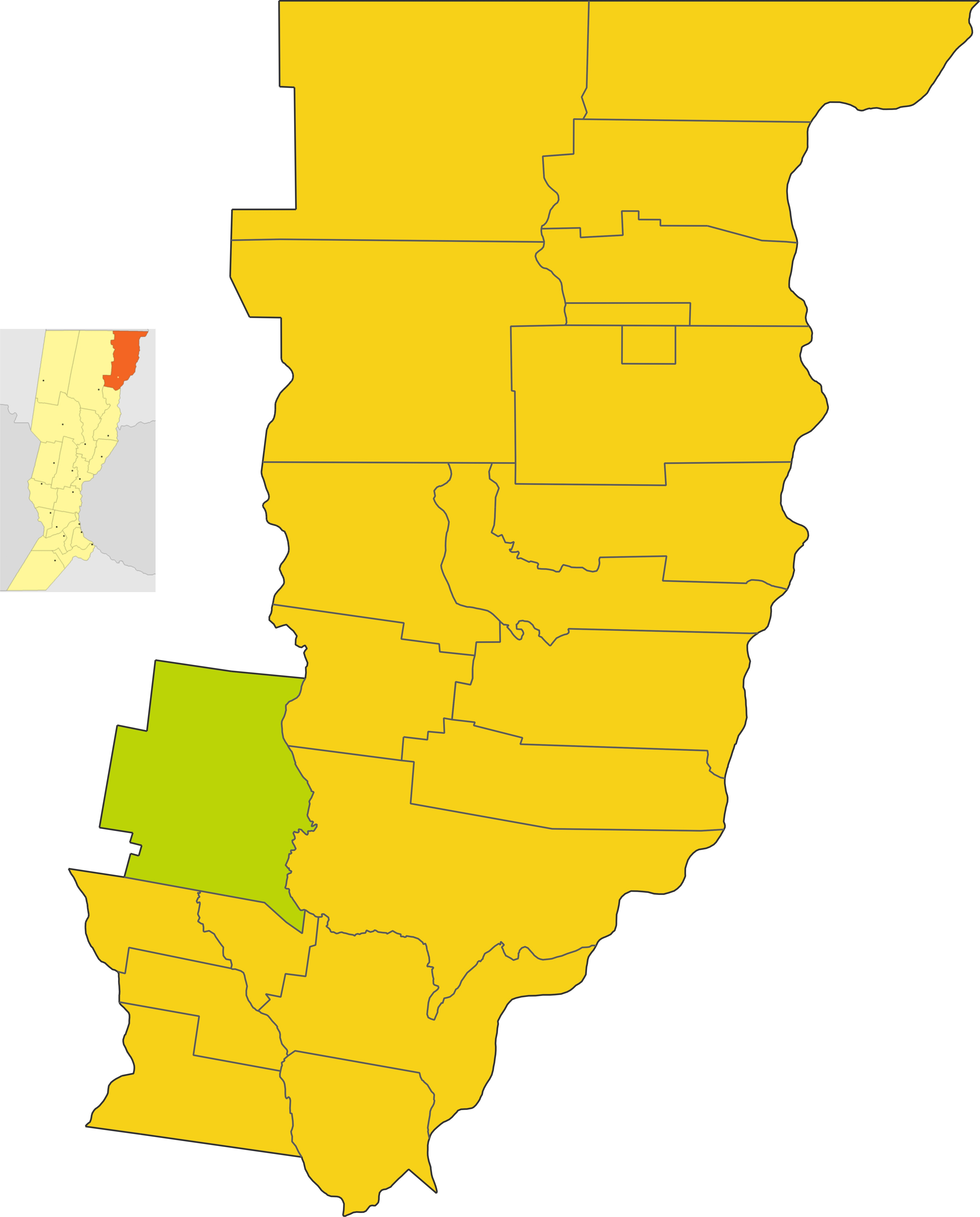 Map of the comuna de La Sarita in General Obligado department, Santa Fe province, Argentina